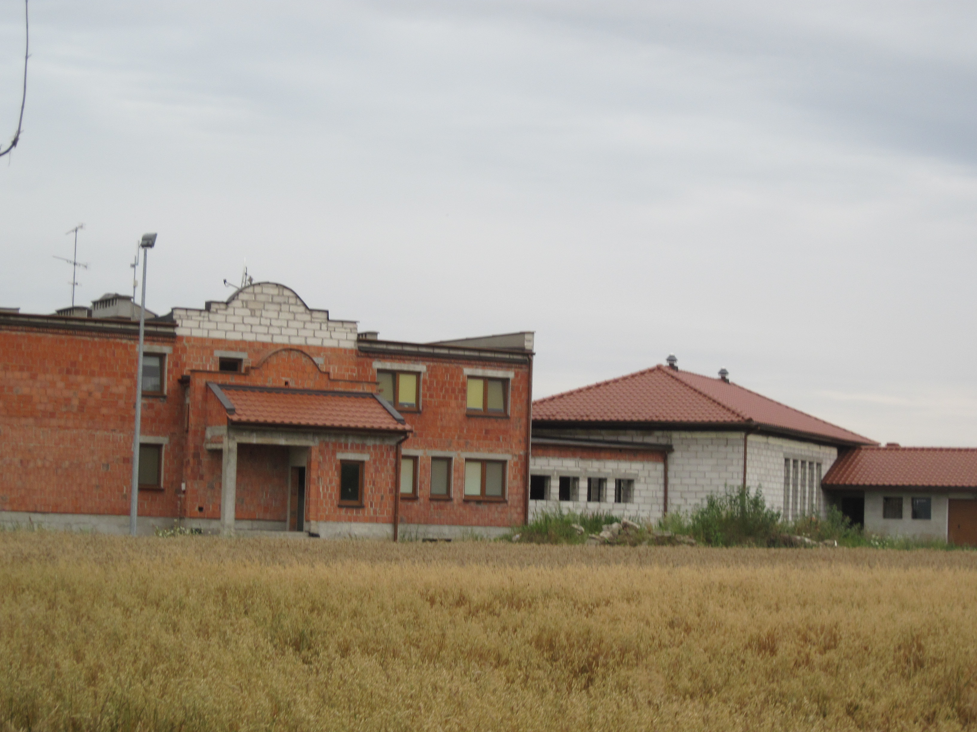 Centrum Parafialne przy ul. E. Orzeszkowej w Gnieźnie